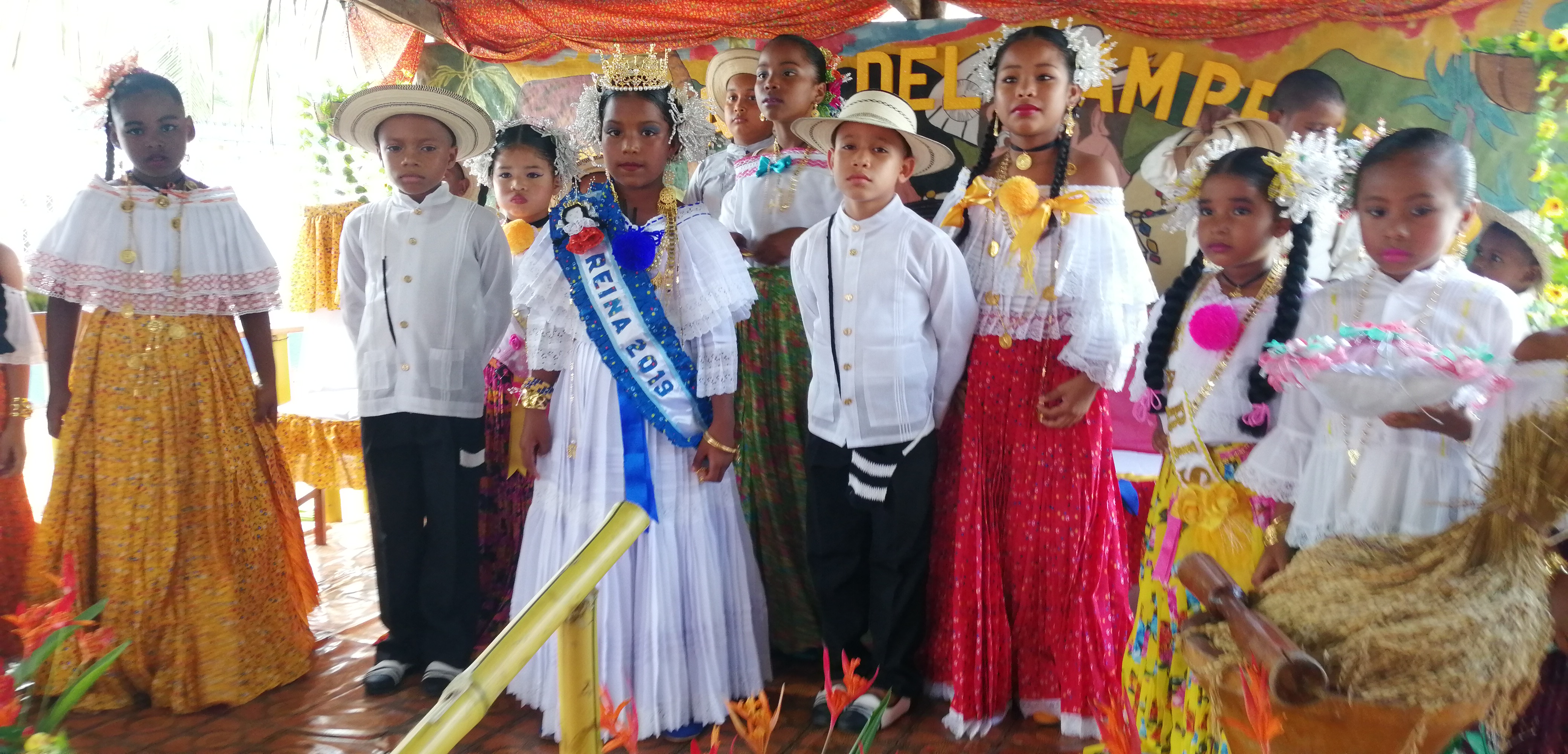 Campesino